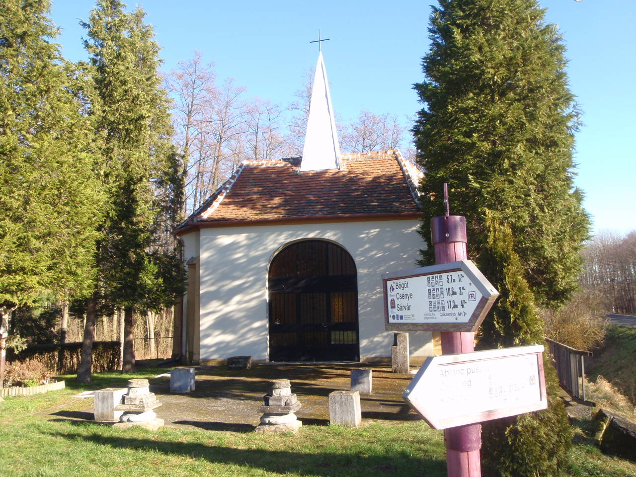 Szentkúti Kápolna Váton